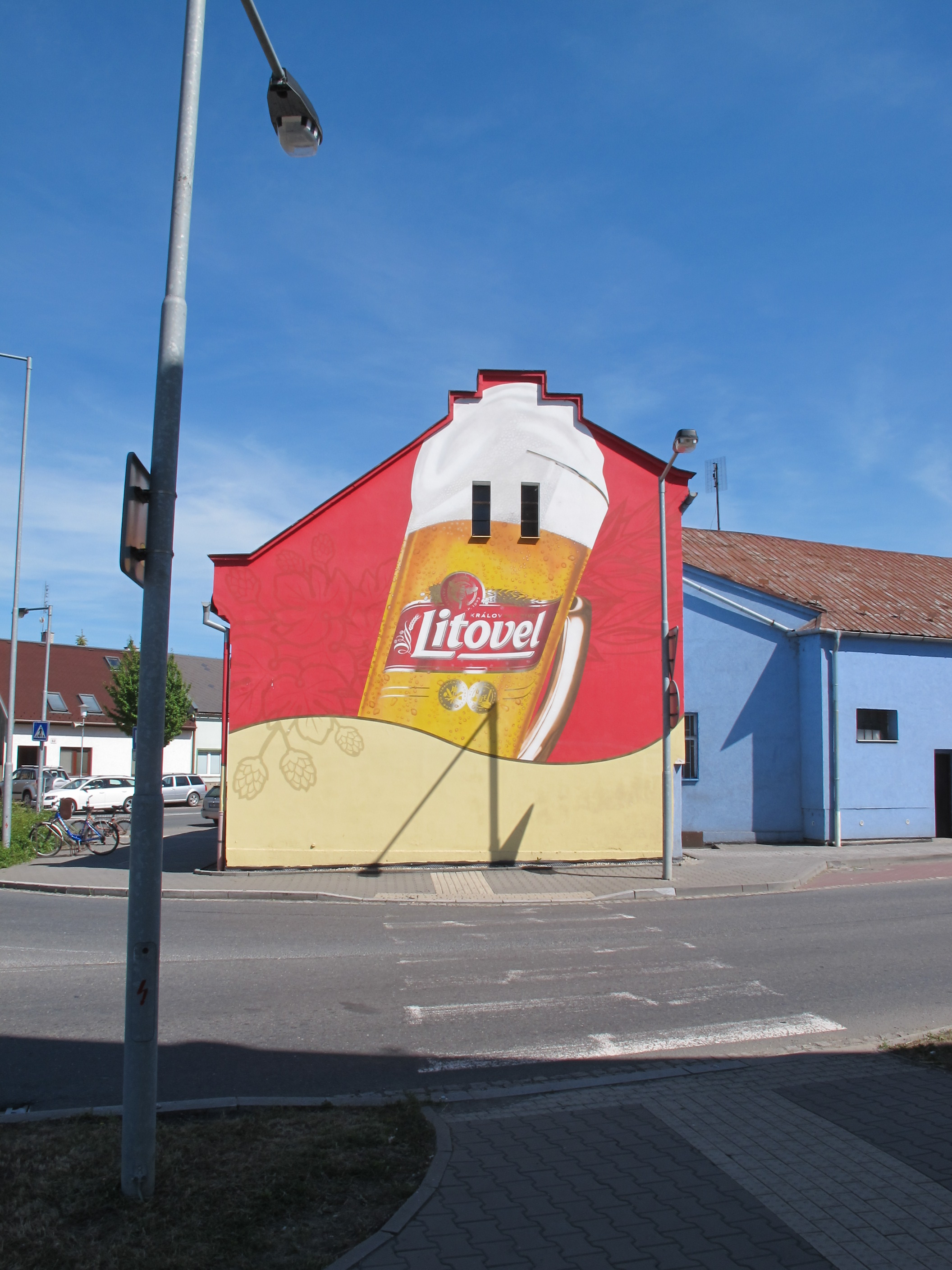 Reklama na pivo Litovel na domě čp. 95 v Litovli. This file was uploaded during the project of WikiTown Litovel.